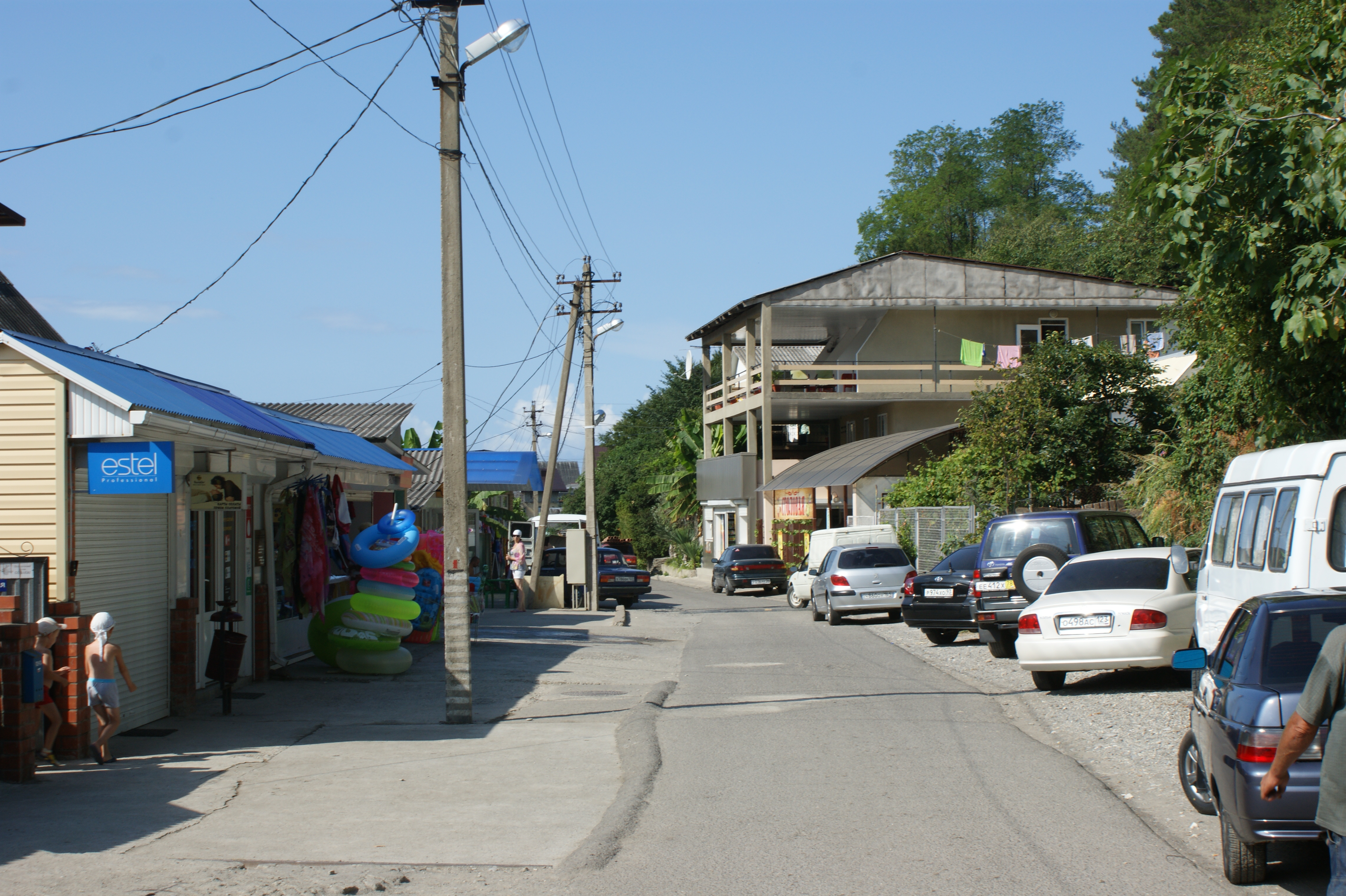 Тихорецкая улица, Солоники, Лазаревский район Сочи.